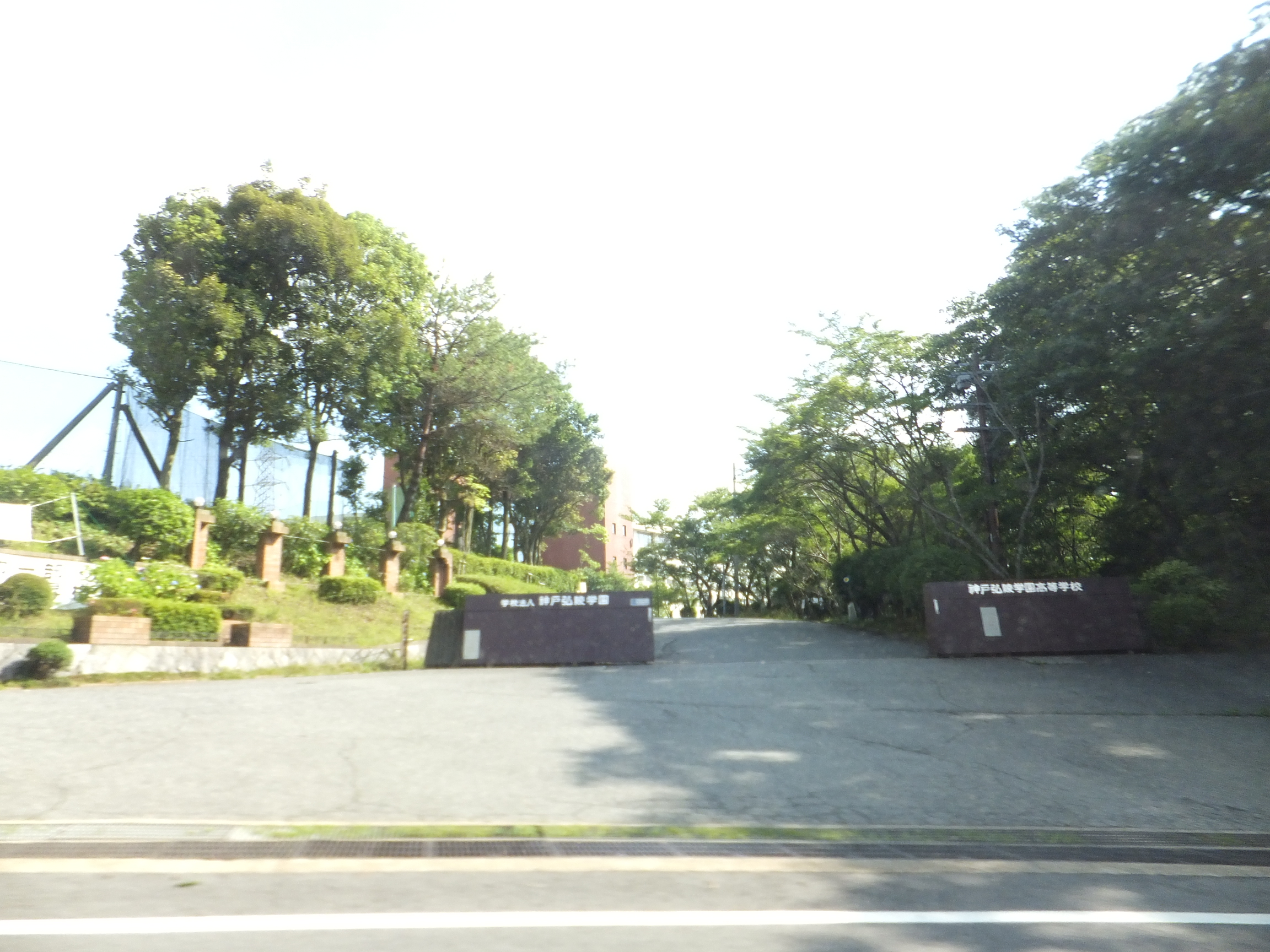 神戸弘陵高等学校